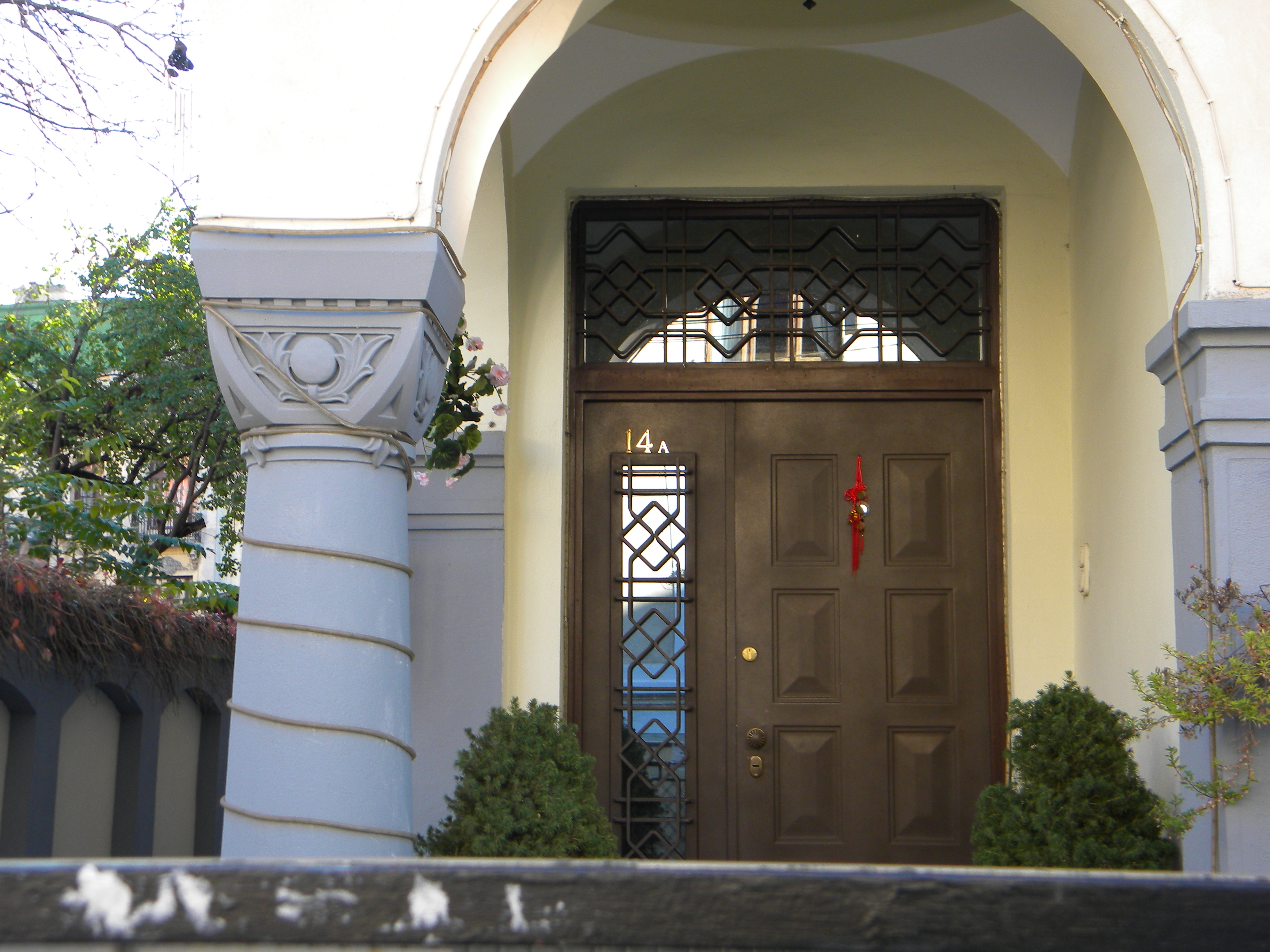 Bucuresti, Romania, Str. Alexandru Philippide nr. 14A, sect. 2 (Cod B-II-m-B-19383) (3 prim)